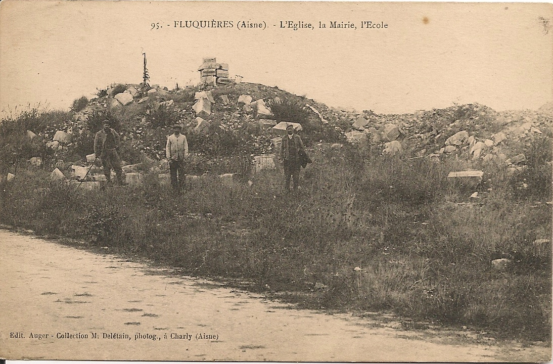 Fluquières Carte postale de 1919.